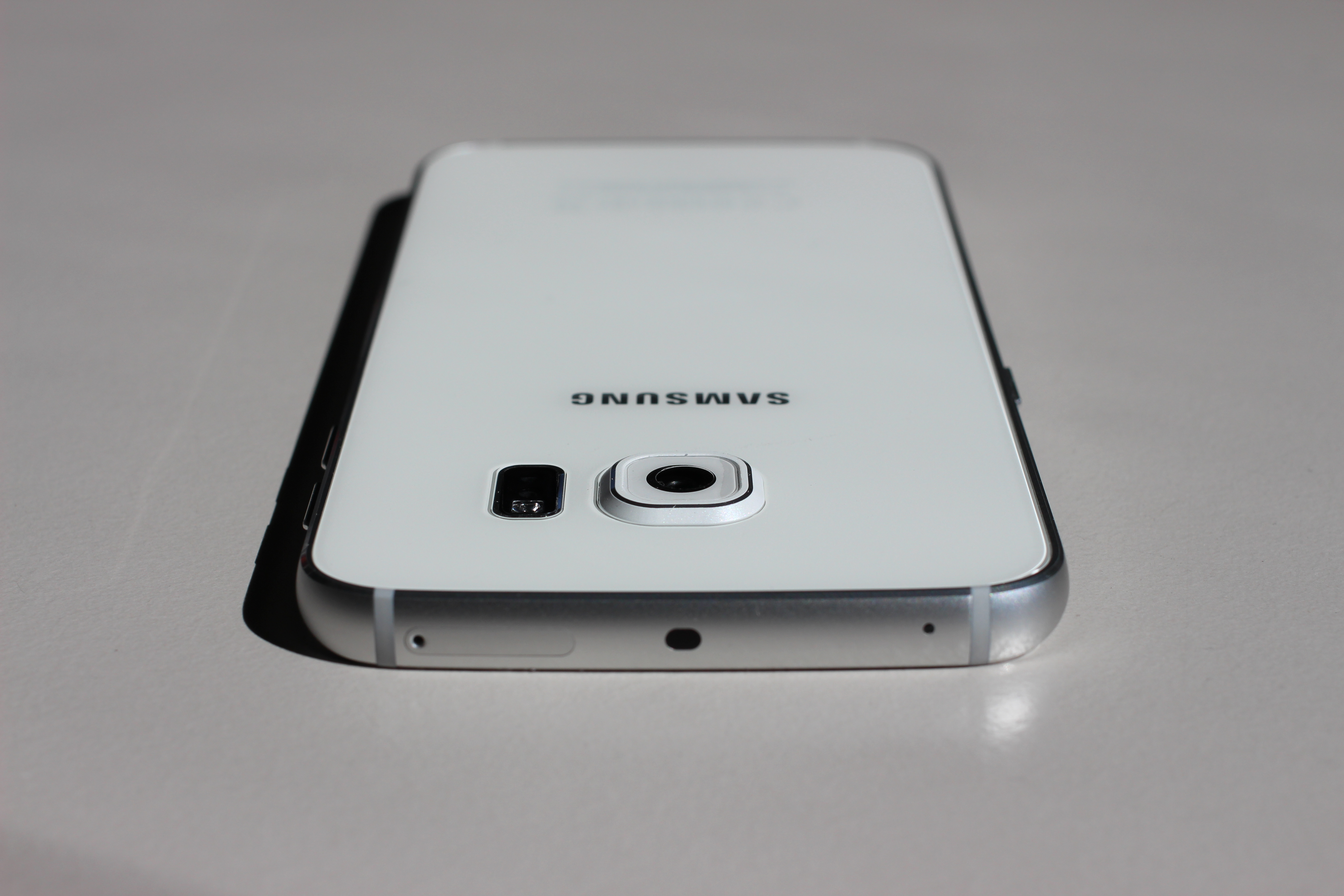 Samsung Galaxy S6 edge